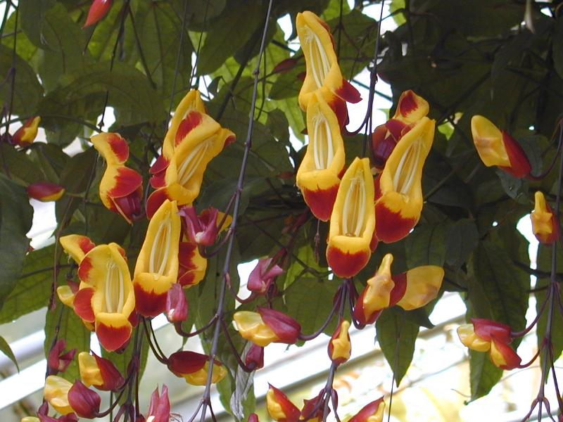 Thunbergia mysoriensis